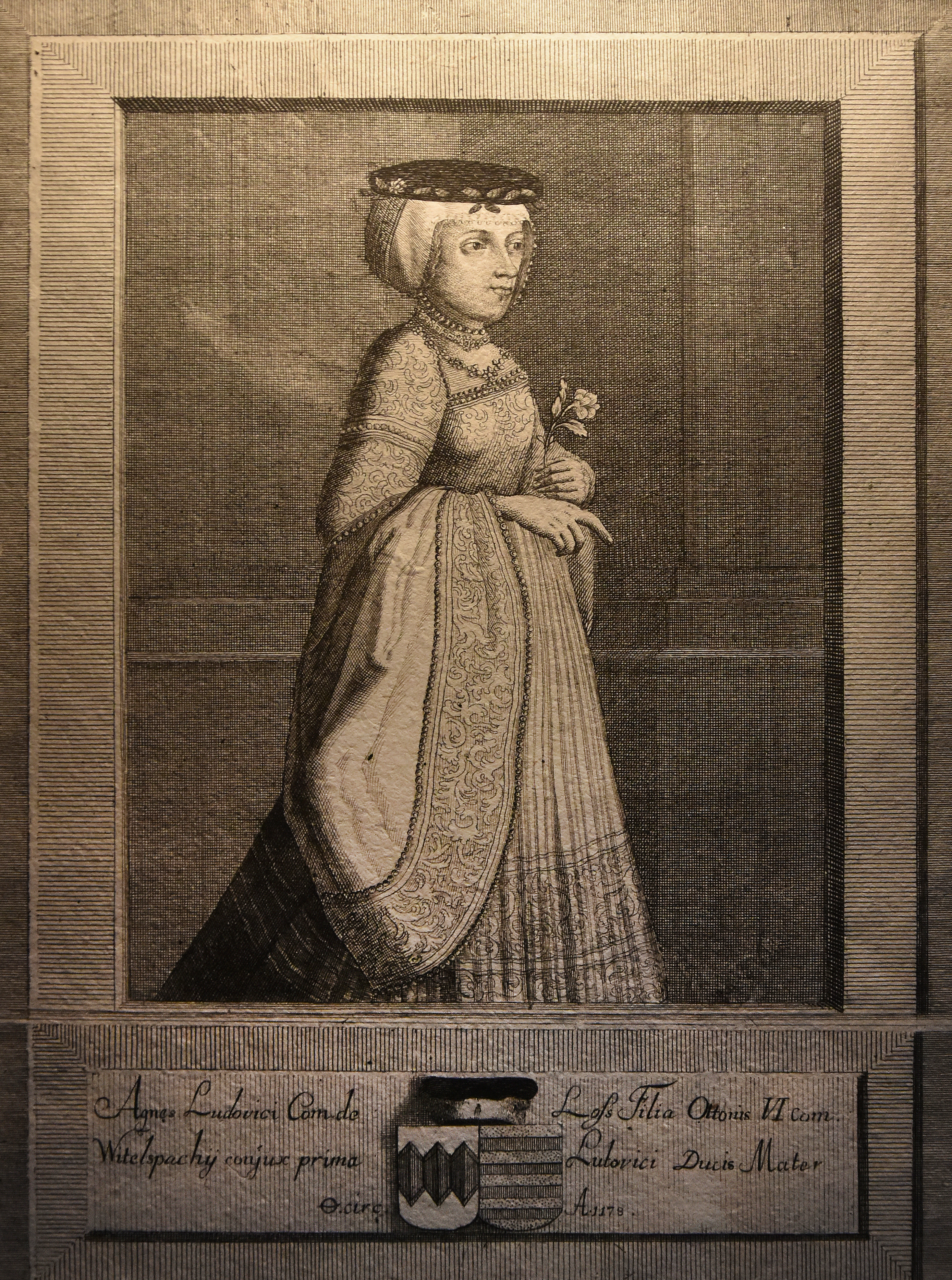 Joseph Anton Zimmermann Agnes van Loon kopergravure uit 1733 - 1000 jaar Loon in Alben Biesen 16-02-2019 The Series Imaginum Augustae Domus Boicae, ad Genuina Ectypa Aliaque Monum Fide Digna delin. et Aaeri Incidit, Monachium (A Series of Portraits of the Noble House of Bavaria...) is a genealogical series of portraits of members of the House of Wittelsbach engraved by Joseph Anton Zimmermann after contemporary and old portraits by different artists, and published since 1773.